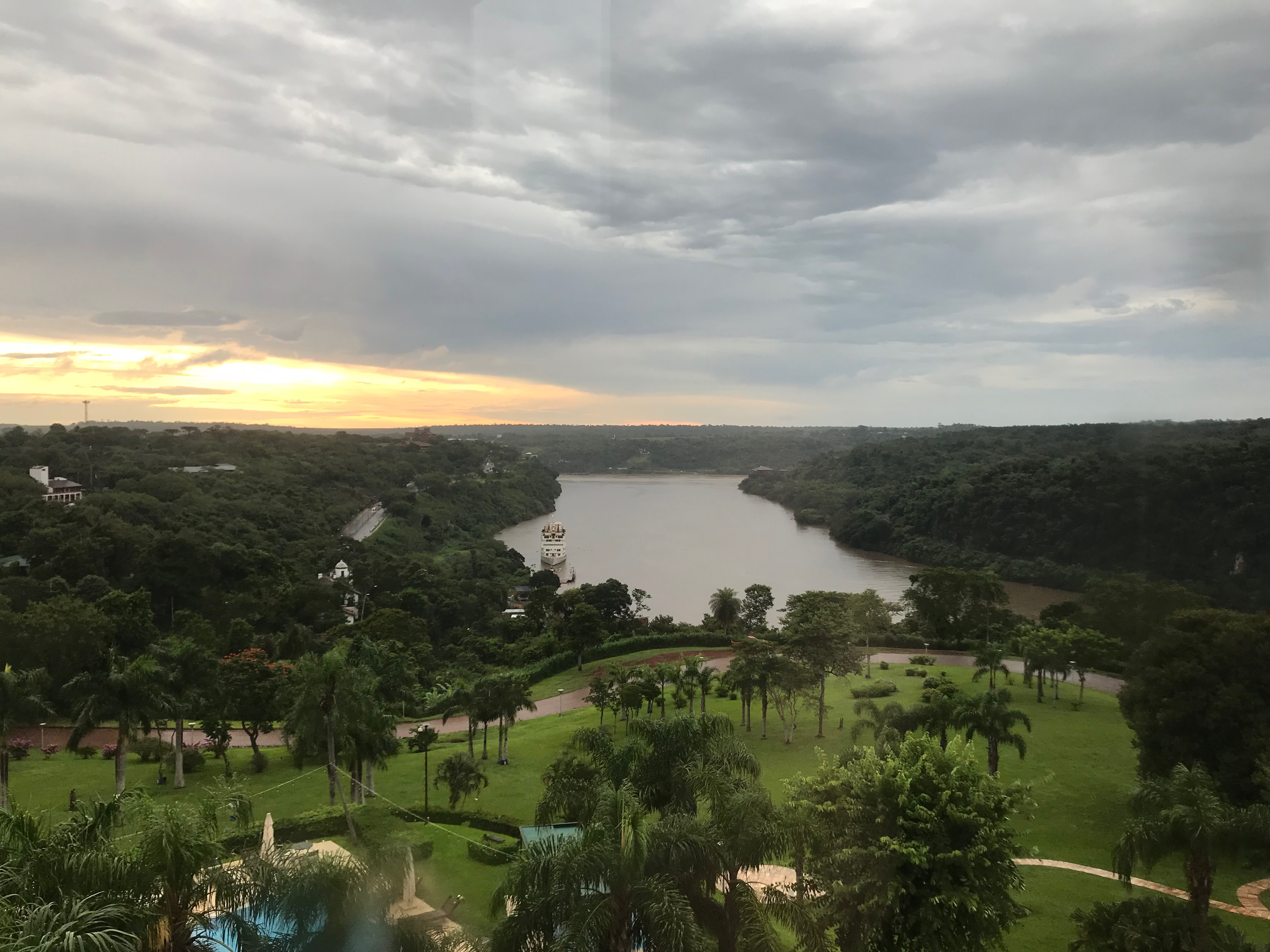 Tripla Fronteira. Paraguai, Brasil e Arxentina.